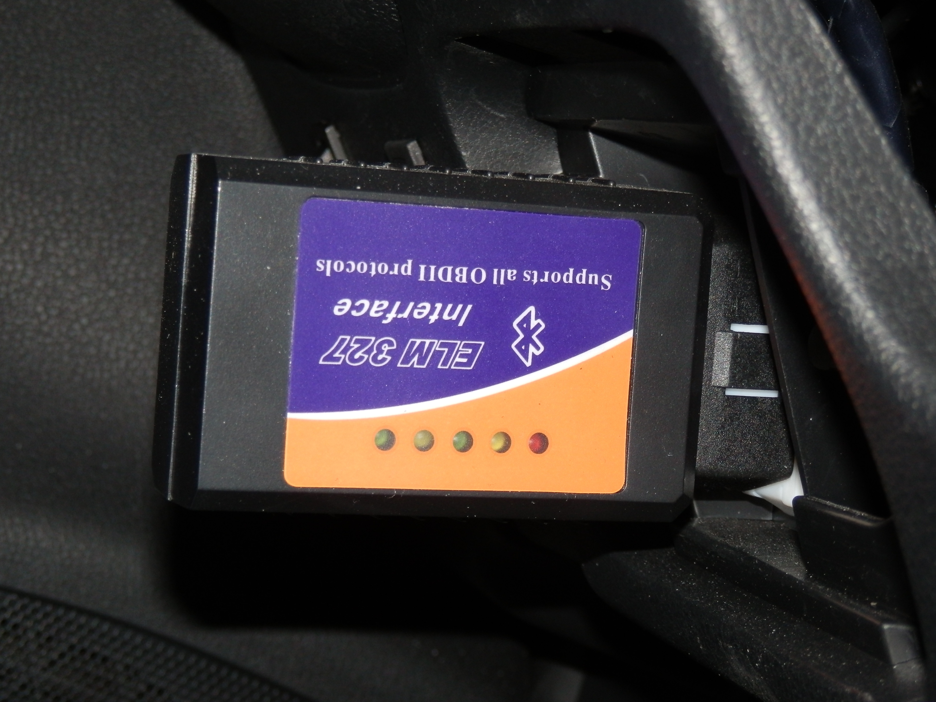 Aparato de diagnóstico OBDII por Bluetooth conectado al puerto de diagnosis de un Nissan Leaf 2013 situado sobre la rodilla izquierda del conductor.